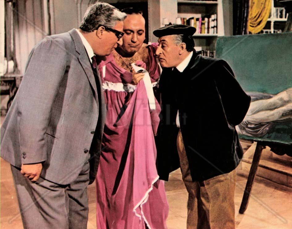 Totò, il grande attore italiano